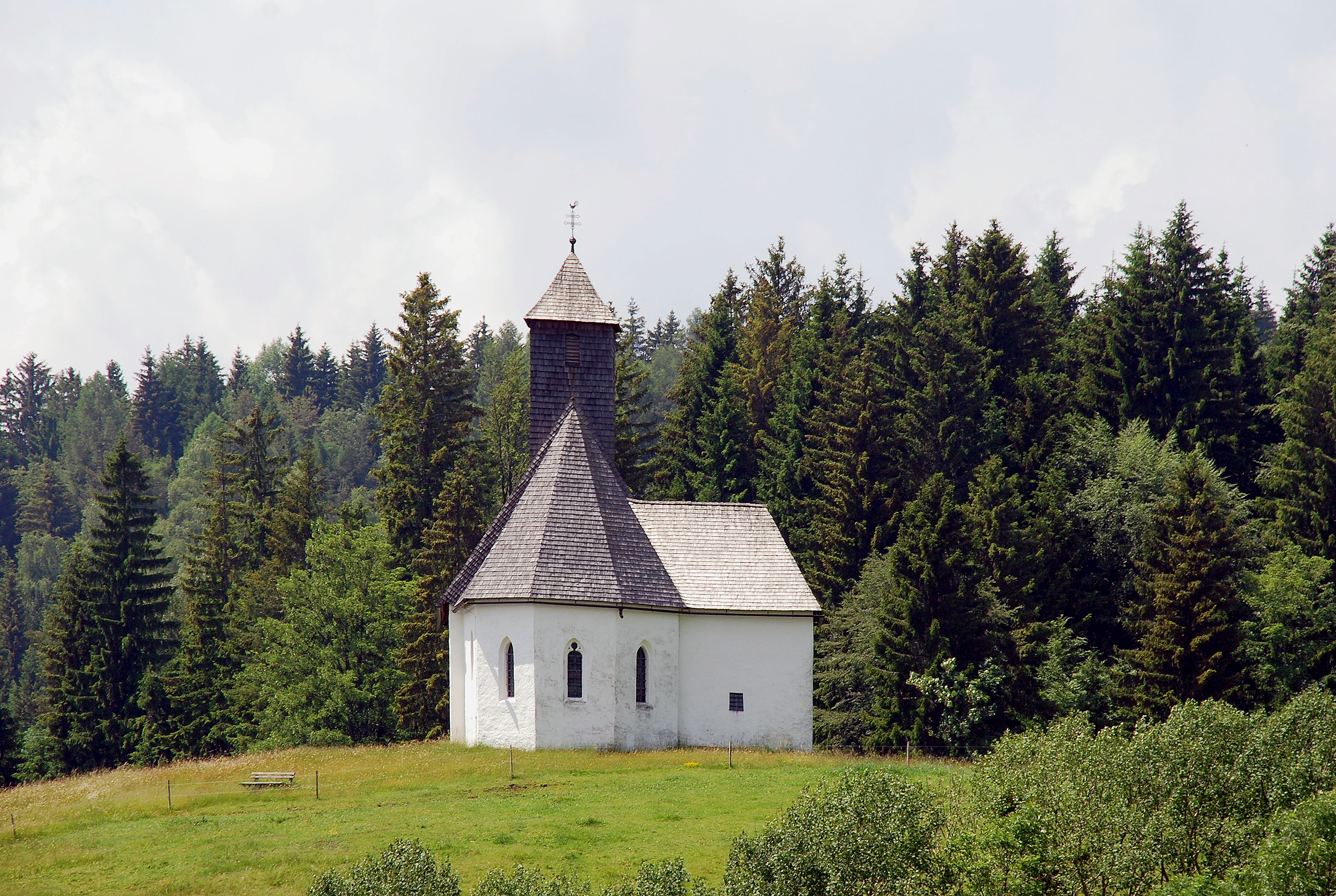 Aibl, Steiermark, Österreich: Kirche St. Leonhard in der Ebene bei St. Leonhard